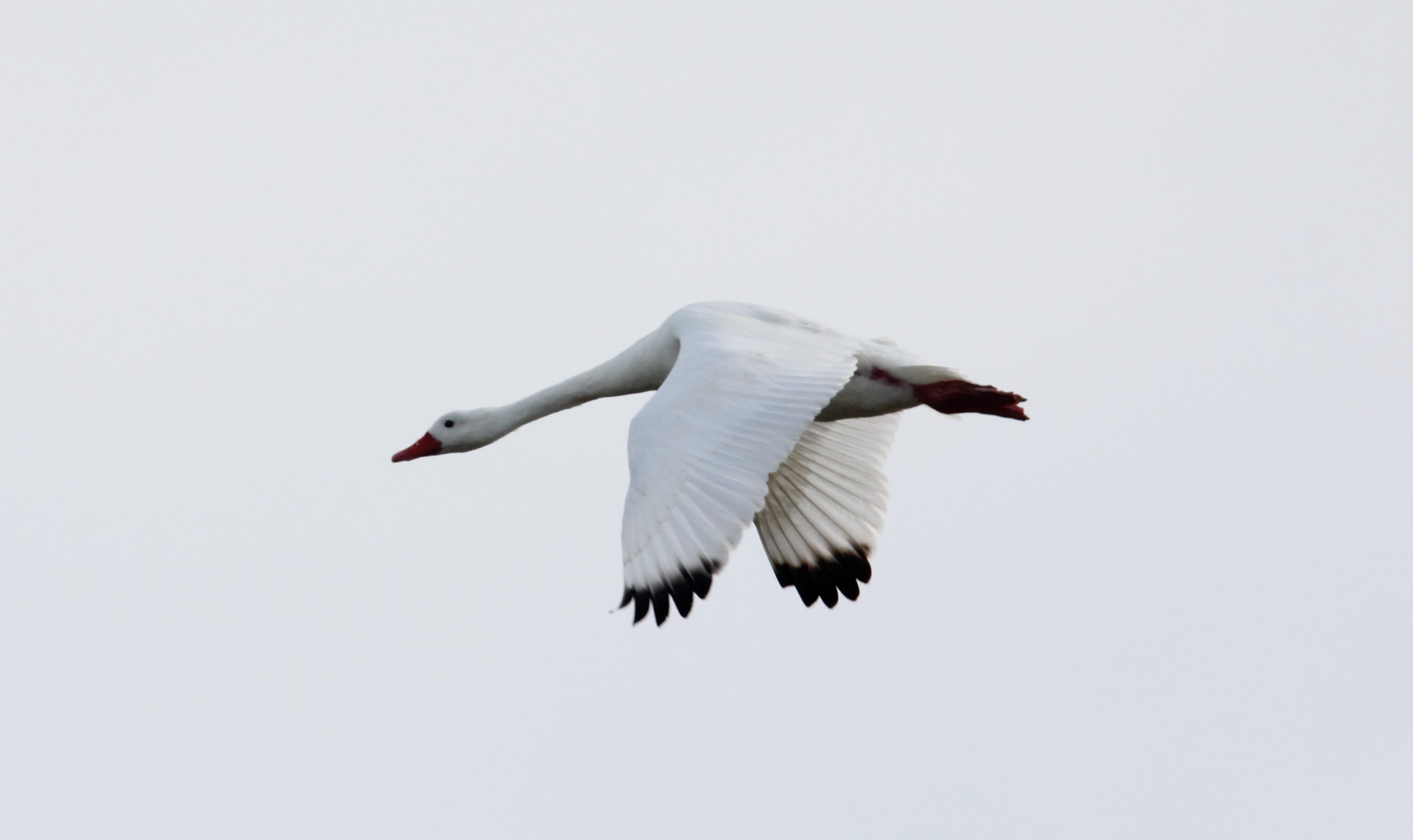 Coscoroba Swan (Coscoroba coscoroba)